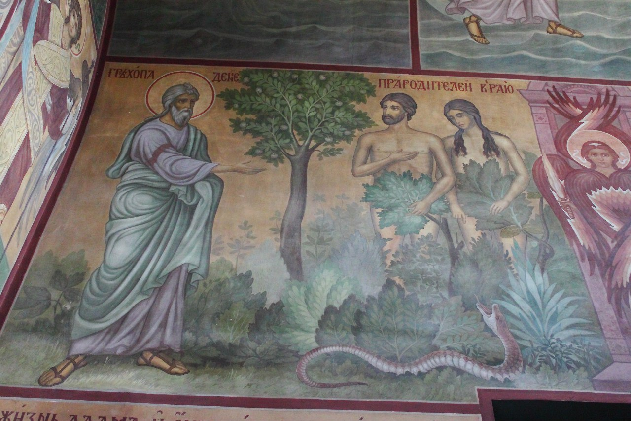 Фреска с изображением Грехопадения Адама и Евы на стене Софийского собора в Новгороде. XIX век.